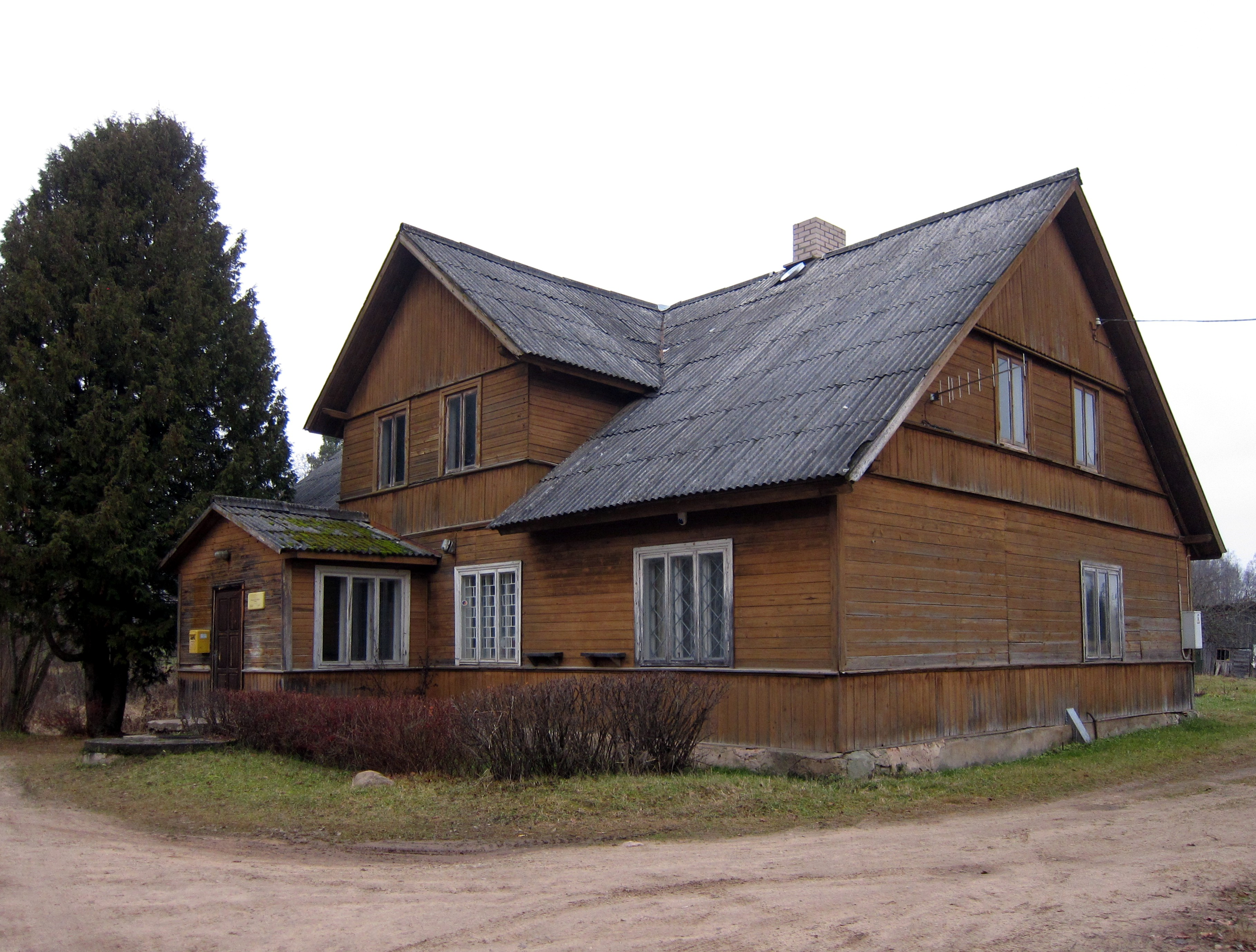 Galgauskas pasta ēka